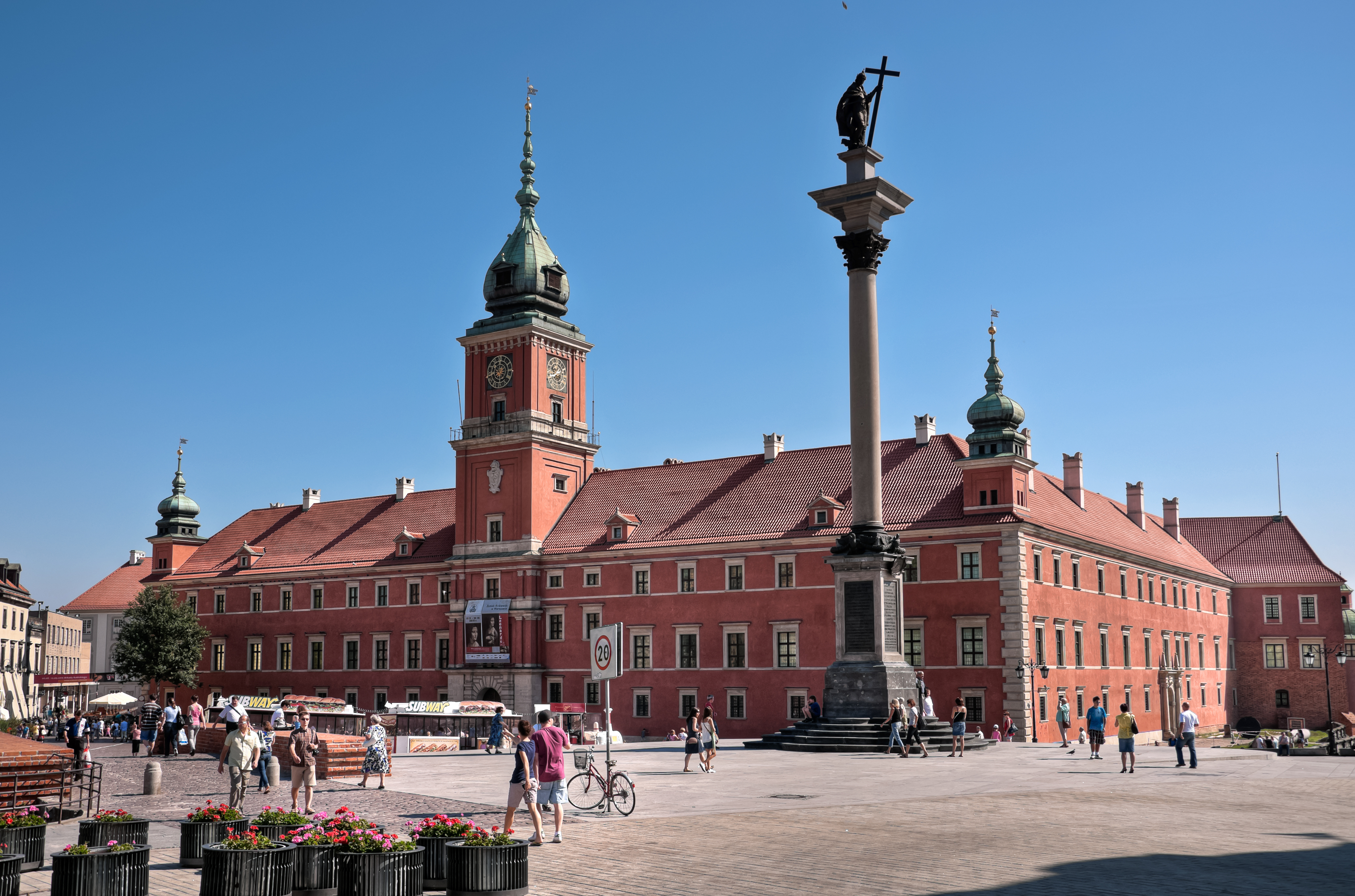 Zamek Królewski, Warszawa